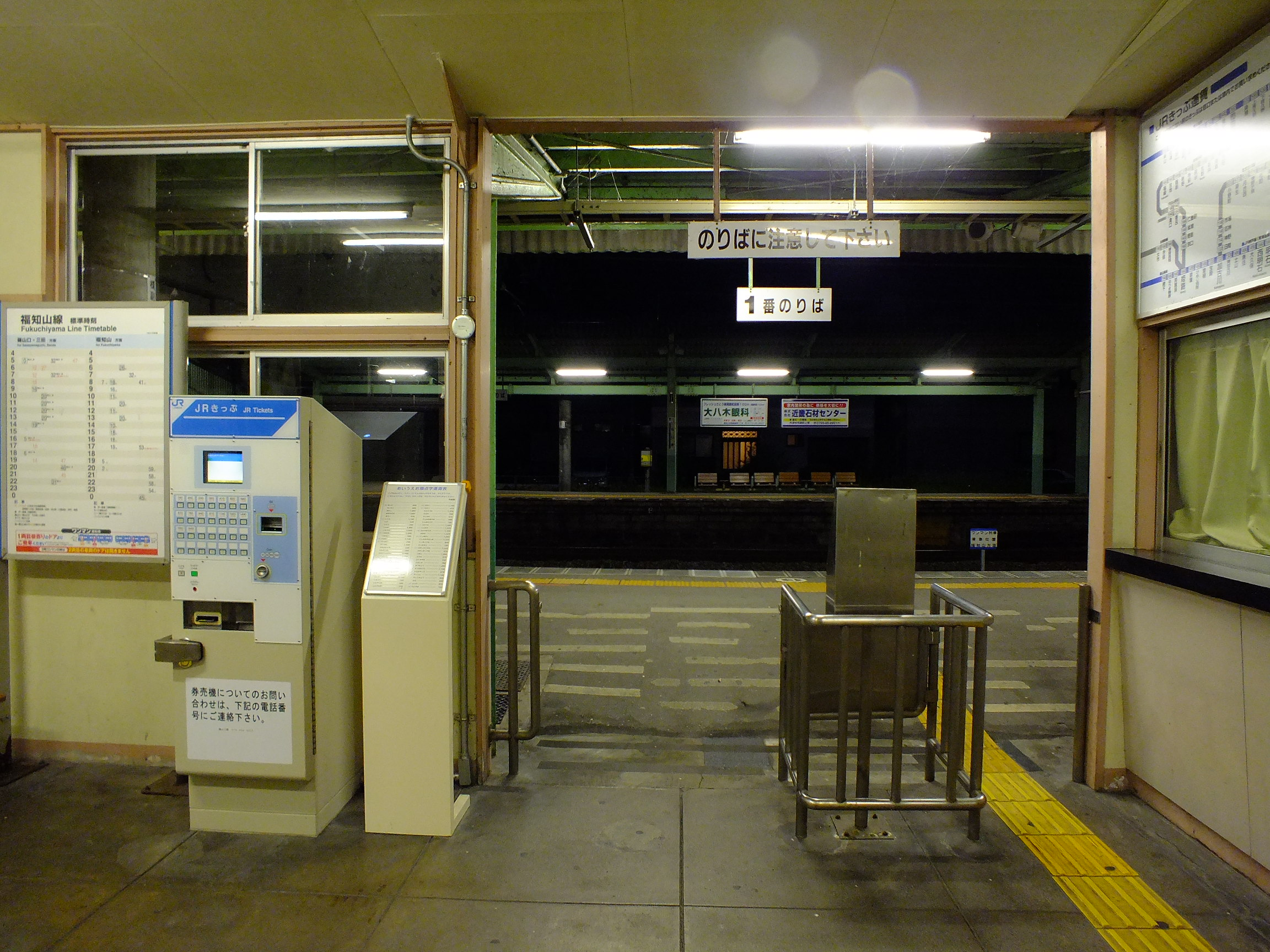 20140729 Ichijima-Kawasuso Matsuri 市島川裾祭（丹波市市島町）市島駅